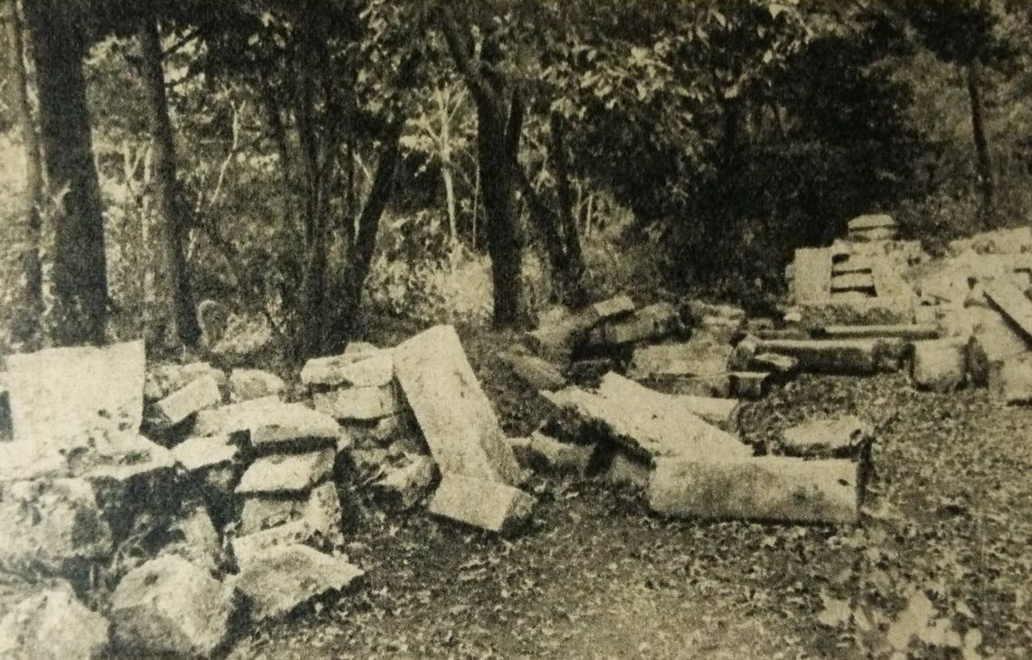 第二次大本事件の弾圧の跡